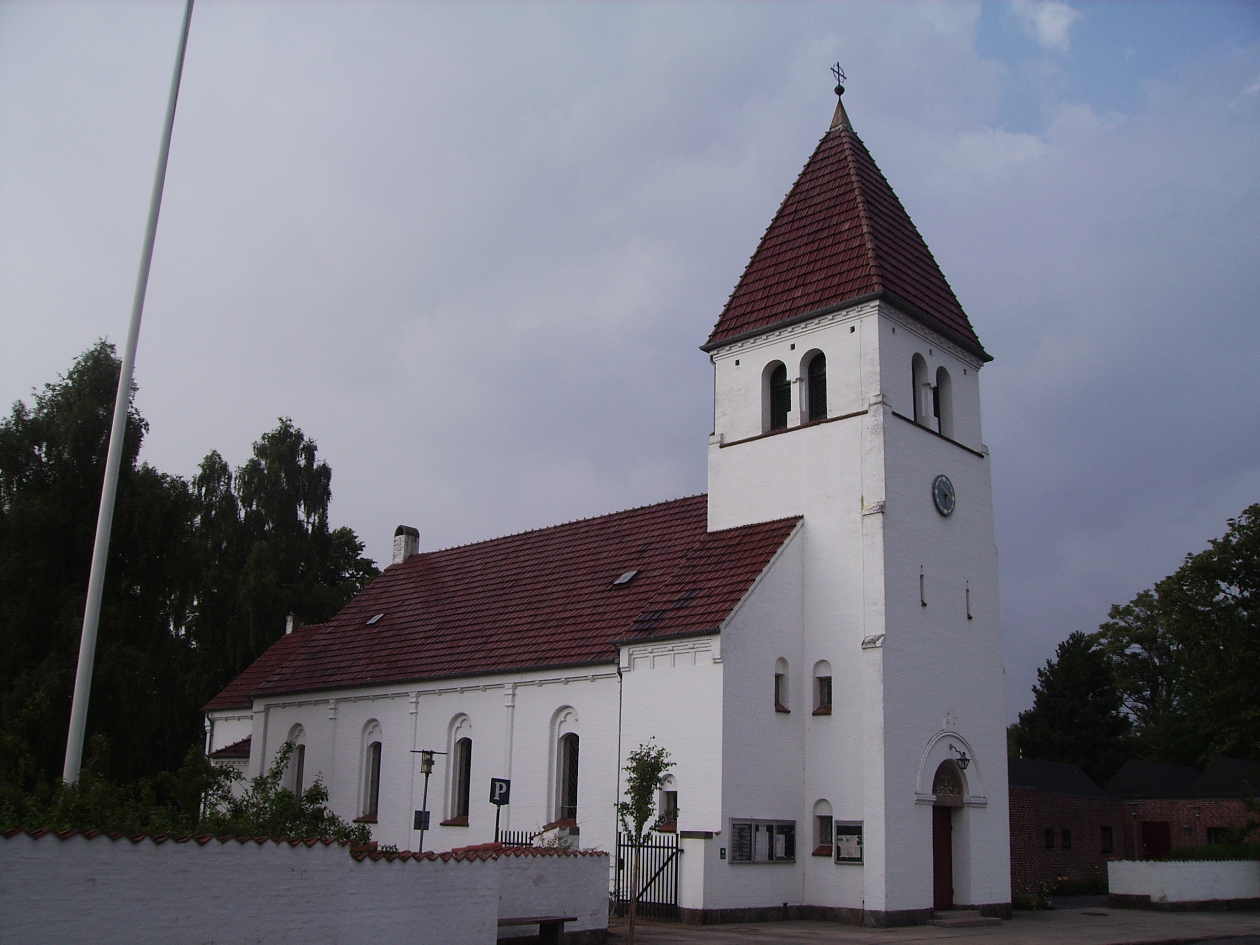 Vor Frelsers Kirke, Korsløkke Sogn, Odense Herred, Odense Amt, Denmark (Danish Church)